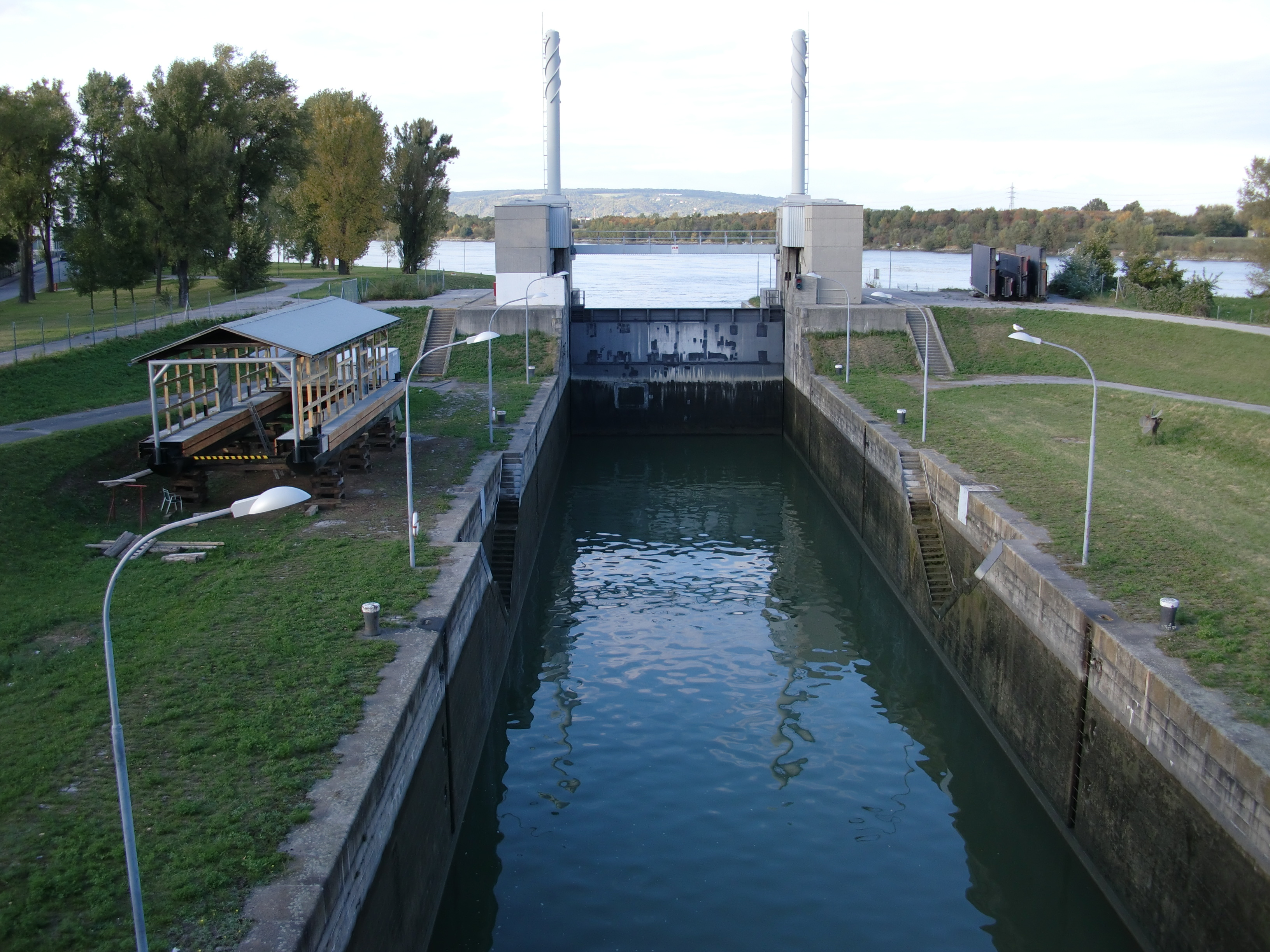 Wien, Schleuse Nussdorf, verbindet die Donau mit dem Donaukanal. Blick vom unteren Schleusentor über die Schleusenkammer, im Hintergrund die Donau.